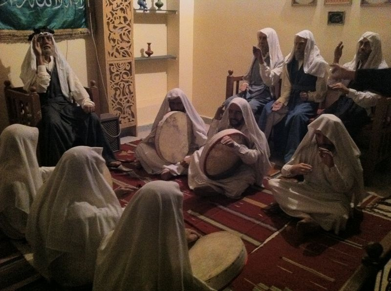 أحد الجلسات الصوفية/ أو الموالد في المتحف البغدادي